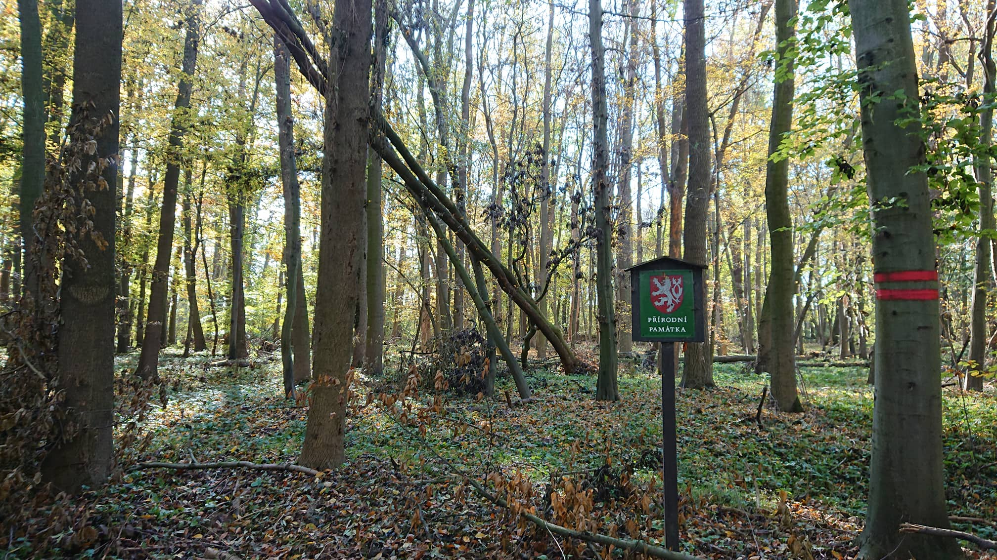 fotka přírodní památky Jiřina - lužní les